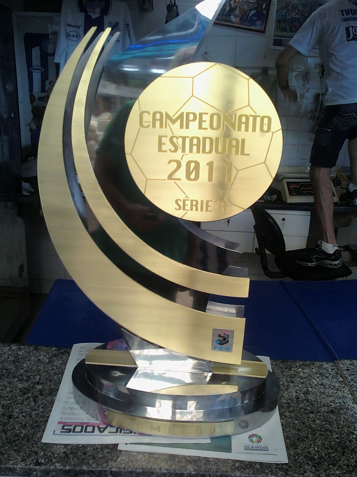 Troféu do capixabão de 2011